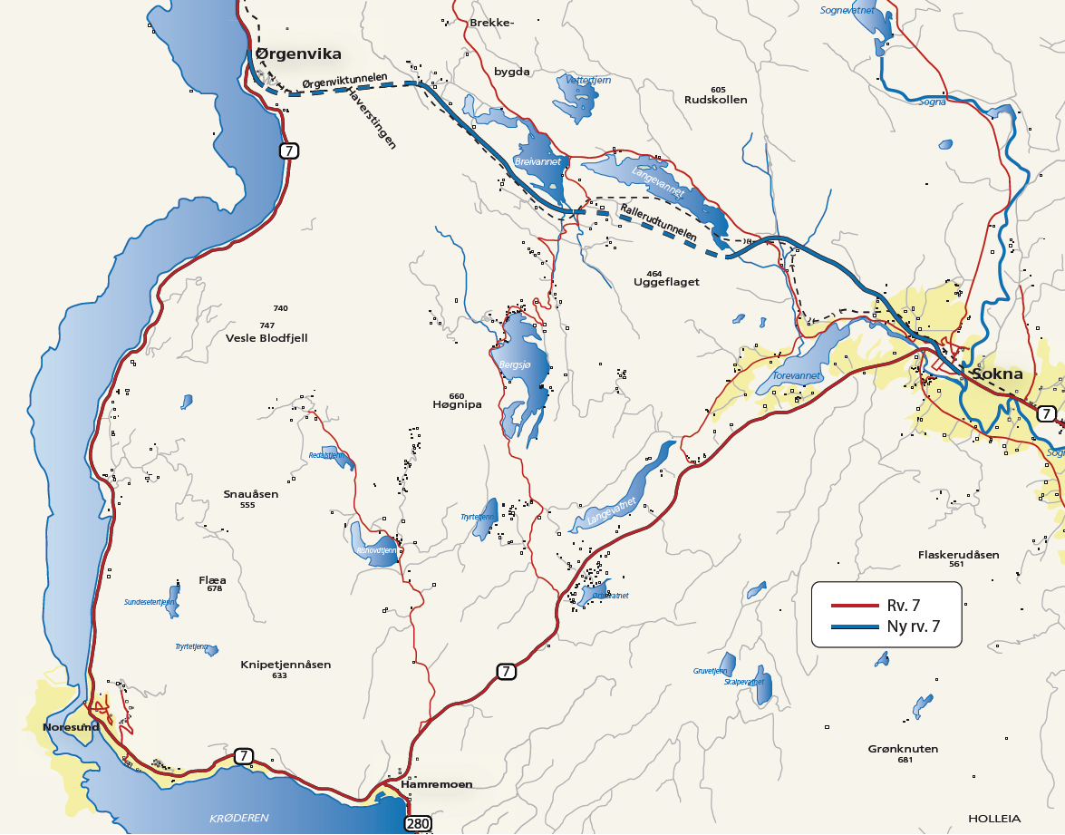 Reguleringsplan Rv 7 Sokna Ørgenvika, oversikt. Kilde: Statens vegvesen (offentlig dokument)